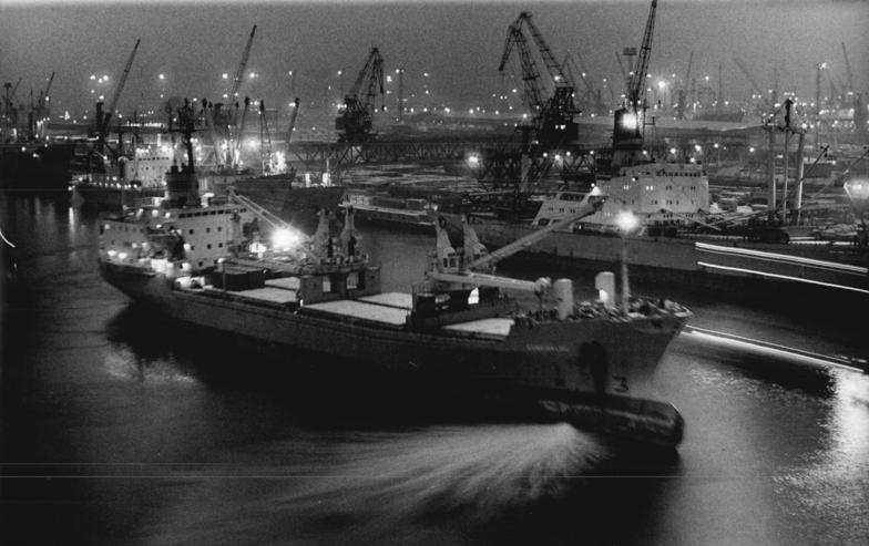 Rostock, Überseehafen, Frachter, Nacht ADN-ZB Sindermann 1.1.85 Rostock: Hafenbilanz - Den bisher höchsten Umschlag in seiner fast 25jährigen Geschichte (rund 18, 9 Millionen Tonnen Güter) weist der Rostocker Überseehafen am Ende des Jahres 1984 auf. Reger Schiffsbetrieb herrschte auch in der Silvesternacht. Die Hafenarbeiter sorgten für eine zügige Abfertigung der Schiffe. 1984 hatten im größten Hafen der DDR mehr als 3.000 Schiffe aus 50 Ländern festgemacht. (siehe 18 N).